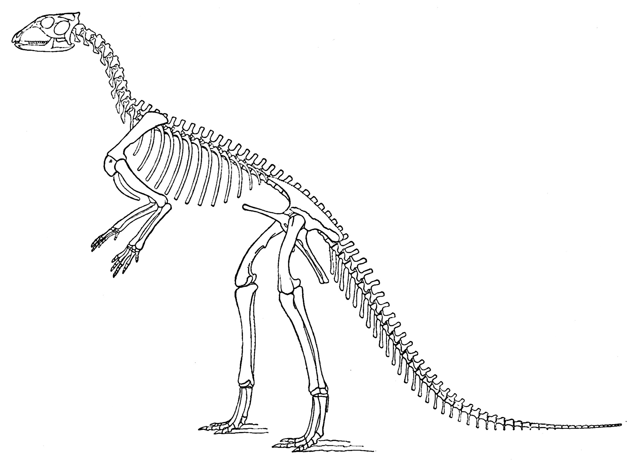 Hypsilophodon foxii skeleton